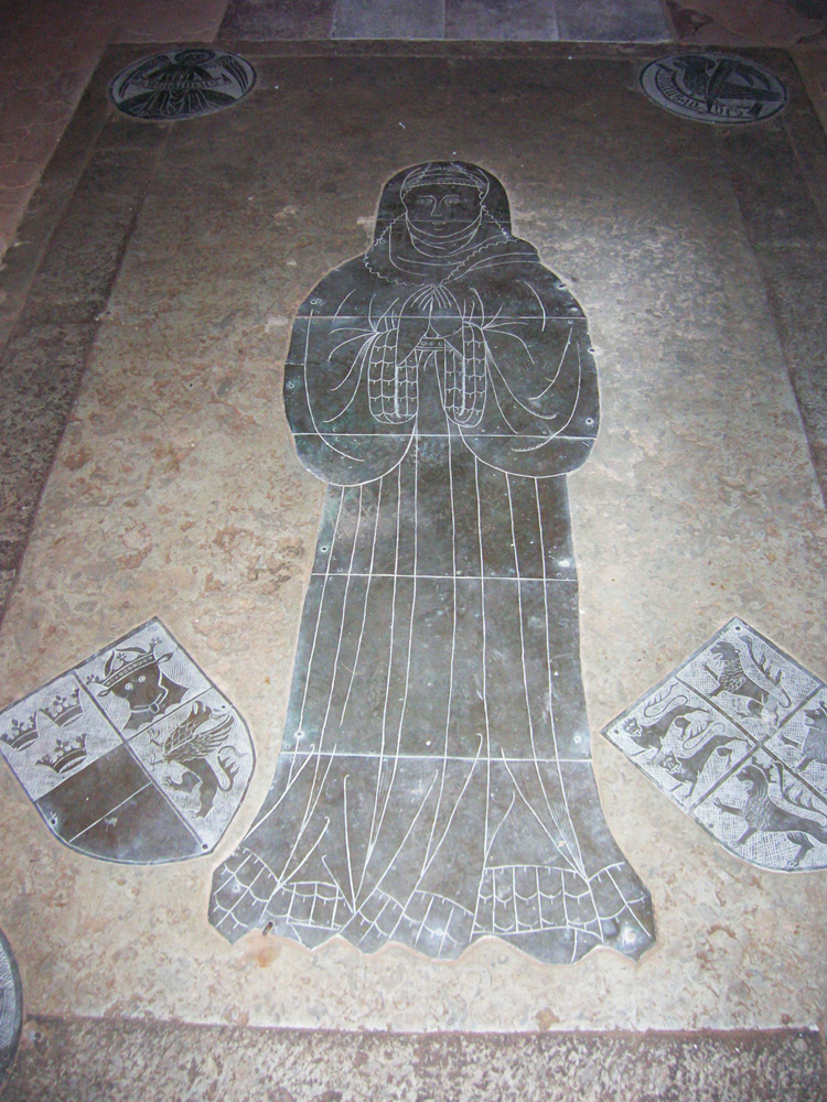 Grabplatte Herzogin Agnes von Mecklenburg-Vorpommern in der Stadtkirche Gadebusch